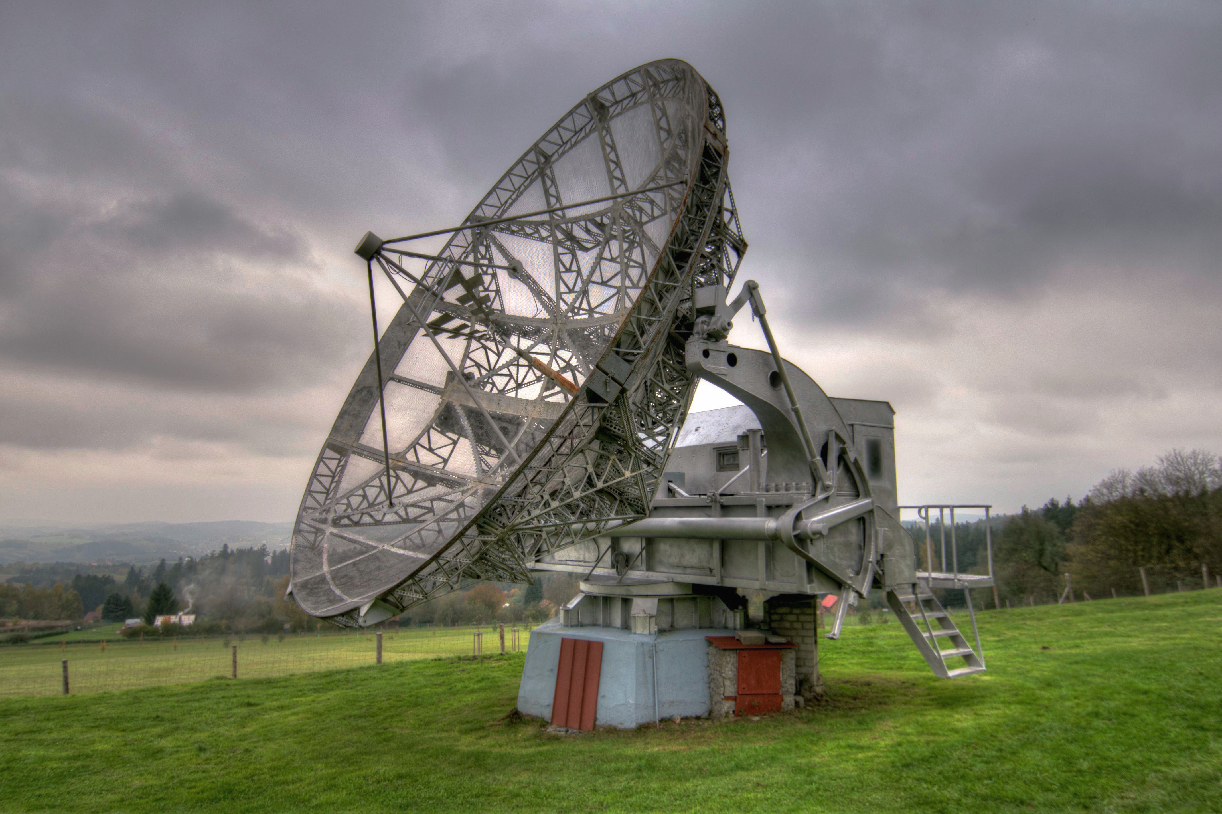 Radioteleskop na "radarové louce"